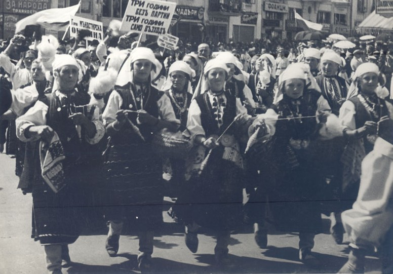 4-ти селскостопански културен и национален събор, 28 - 29 август 1938 г., гр. Варна. Парад на участниците в събора по ул. Княз Борис І. На преден план са представителите на Манастирска община.